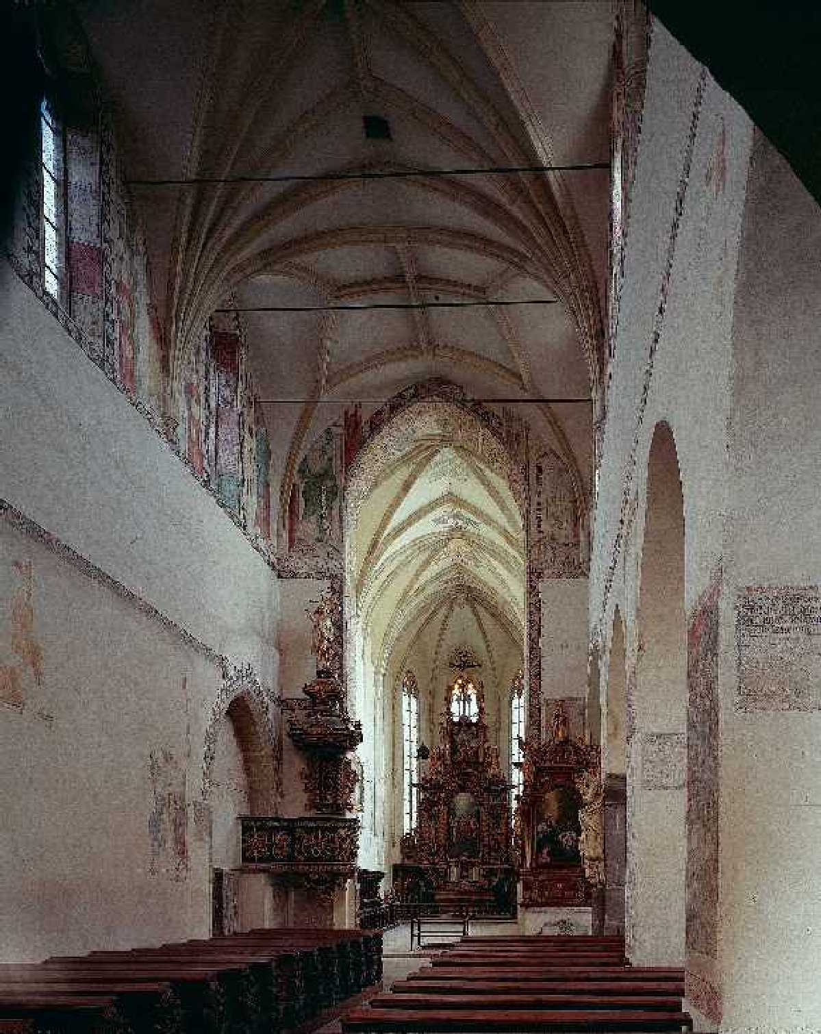 Jindřichův Hradec, kostel sv. Jana Křtitele, ve správě Muzea Jindřichohradecka